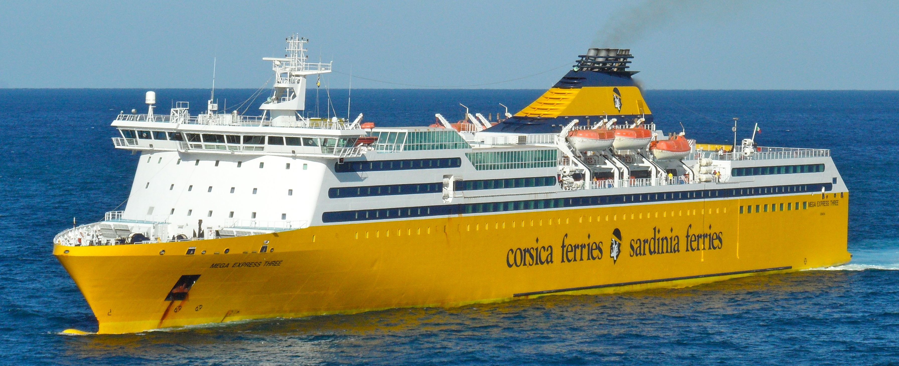 le Mega Express Three à Bastia (Corse) en provenance de Golfo-Aranci (Sardaigne)